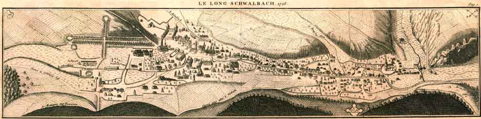 Übersichtskarte von Langenschwalbach, 1728.